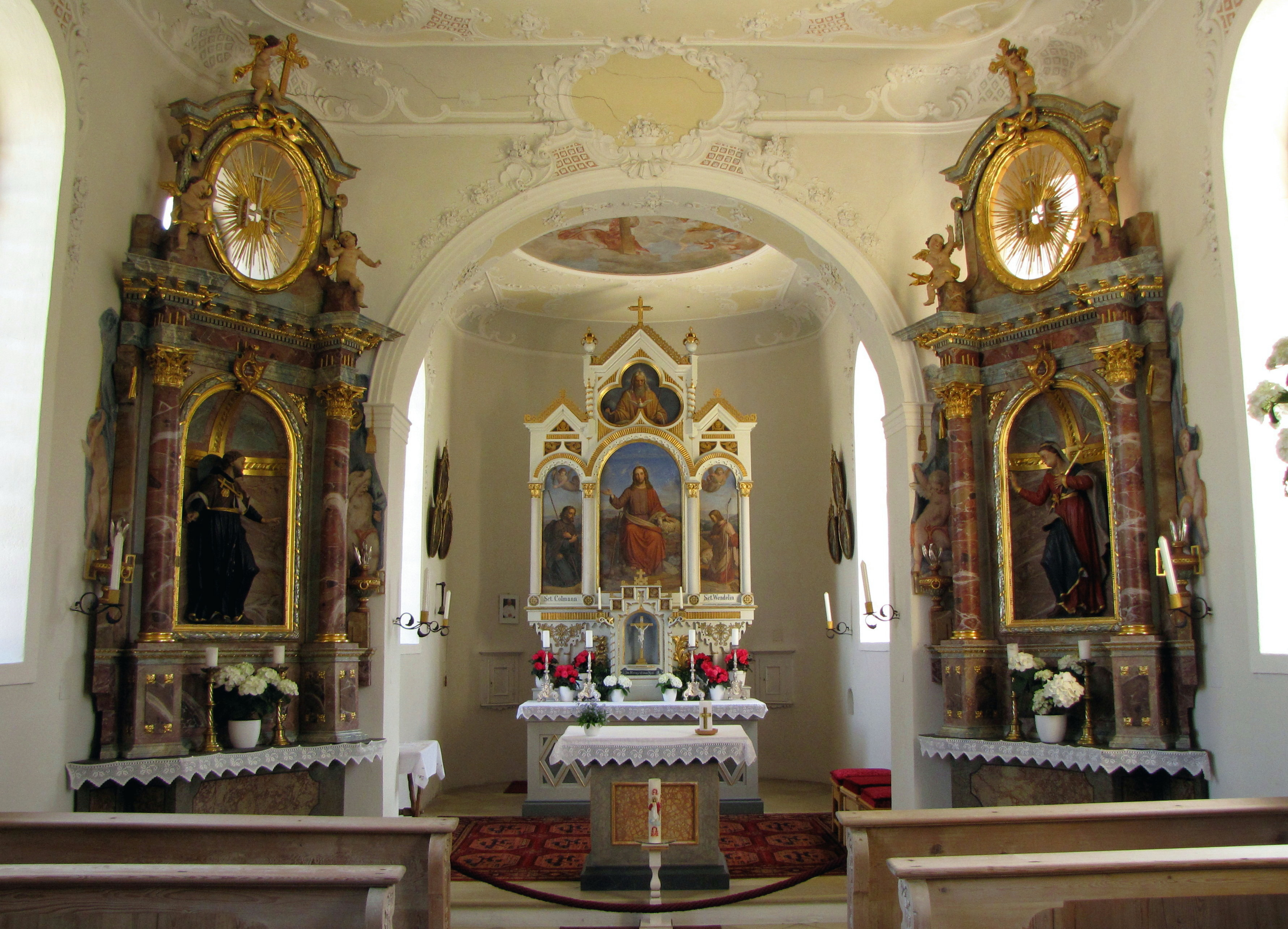 Altäre der Filialkapelle St. Koloman in Pfronten-Ösch